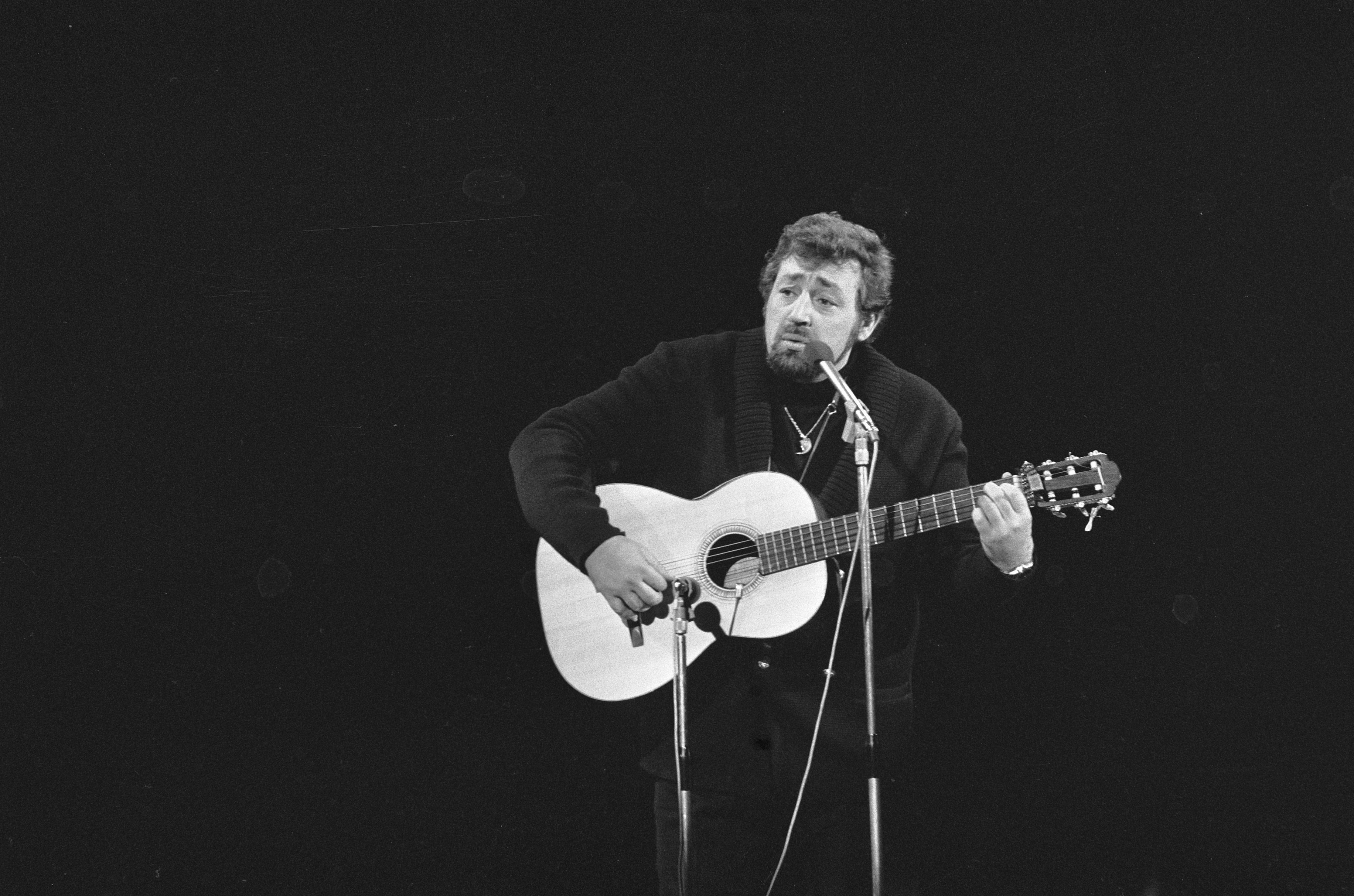 Collectie / Archief : Fotocollectie Anefo Reportage / Serie : Grand Gala du Disque in de RAI Beschrijving : Cornelis Vreeswijk Datum : 17 februari 1974 Locatie : Amsterdam, Noord-Holland Trefwoorden : festivals, zangers Persoonsnaam : Vreeswijk, Cornelis Instellingsnaam : RAI Fotograaf : Fotograaf Onbekend / Anefo Auteursrechthebbende : Nationaal Archief Materiaalsoort : Negatief (zwart/wit) Nummer archiefinventaris : bekijk toegang 2.24.01.05 Bestanddeelnummer : 927-0101